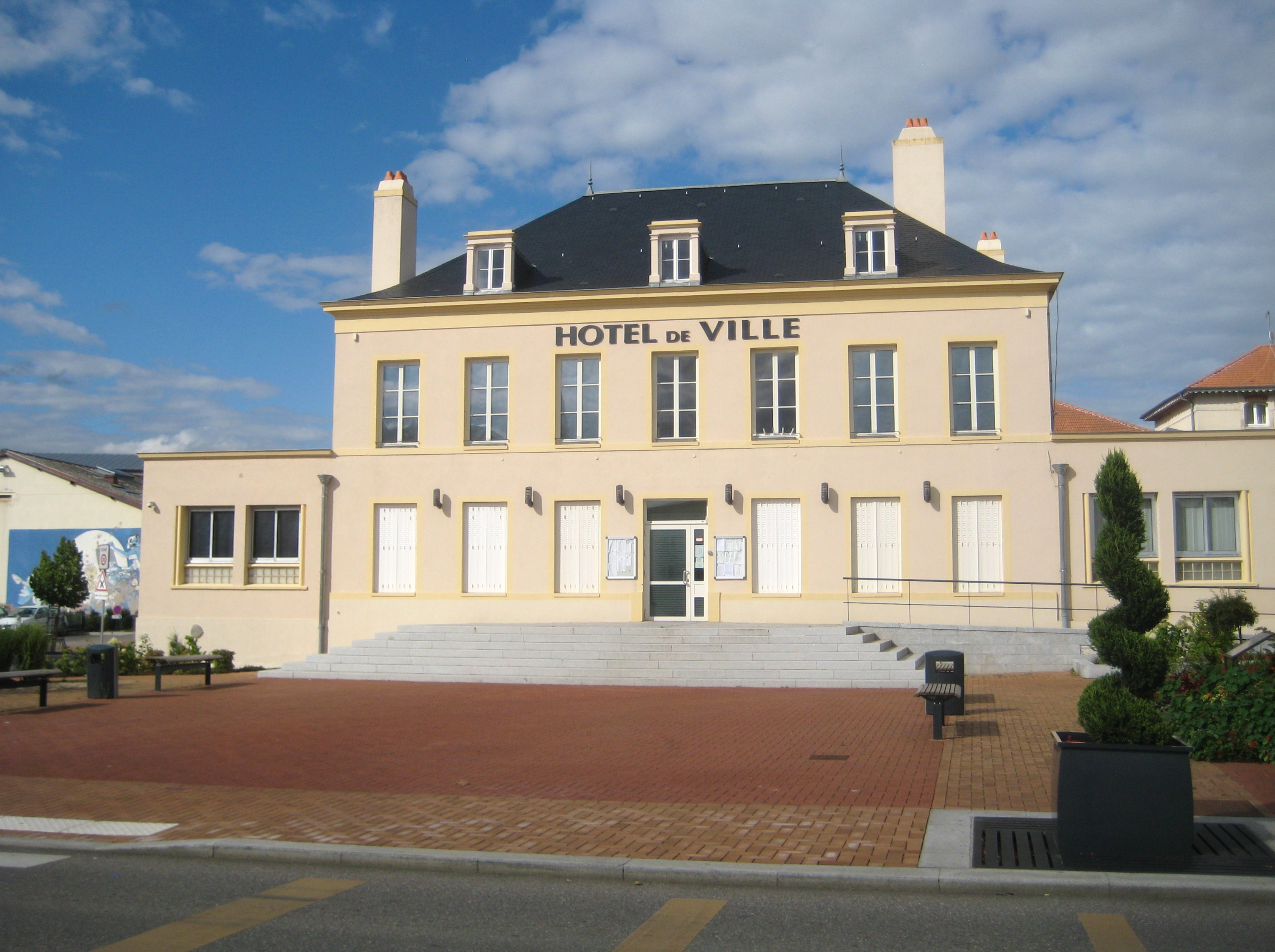 Description hotel de ville Jarny hotel de ville Jarny